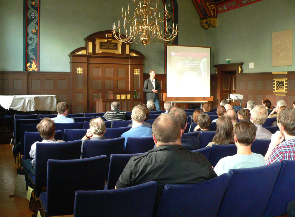 Vortragsverstaltung während der Jahrestagung der Archäologischen Kommission für Niedersachsen bei der Jahresversammlung 2018 in Nienburg